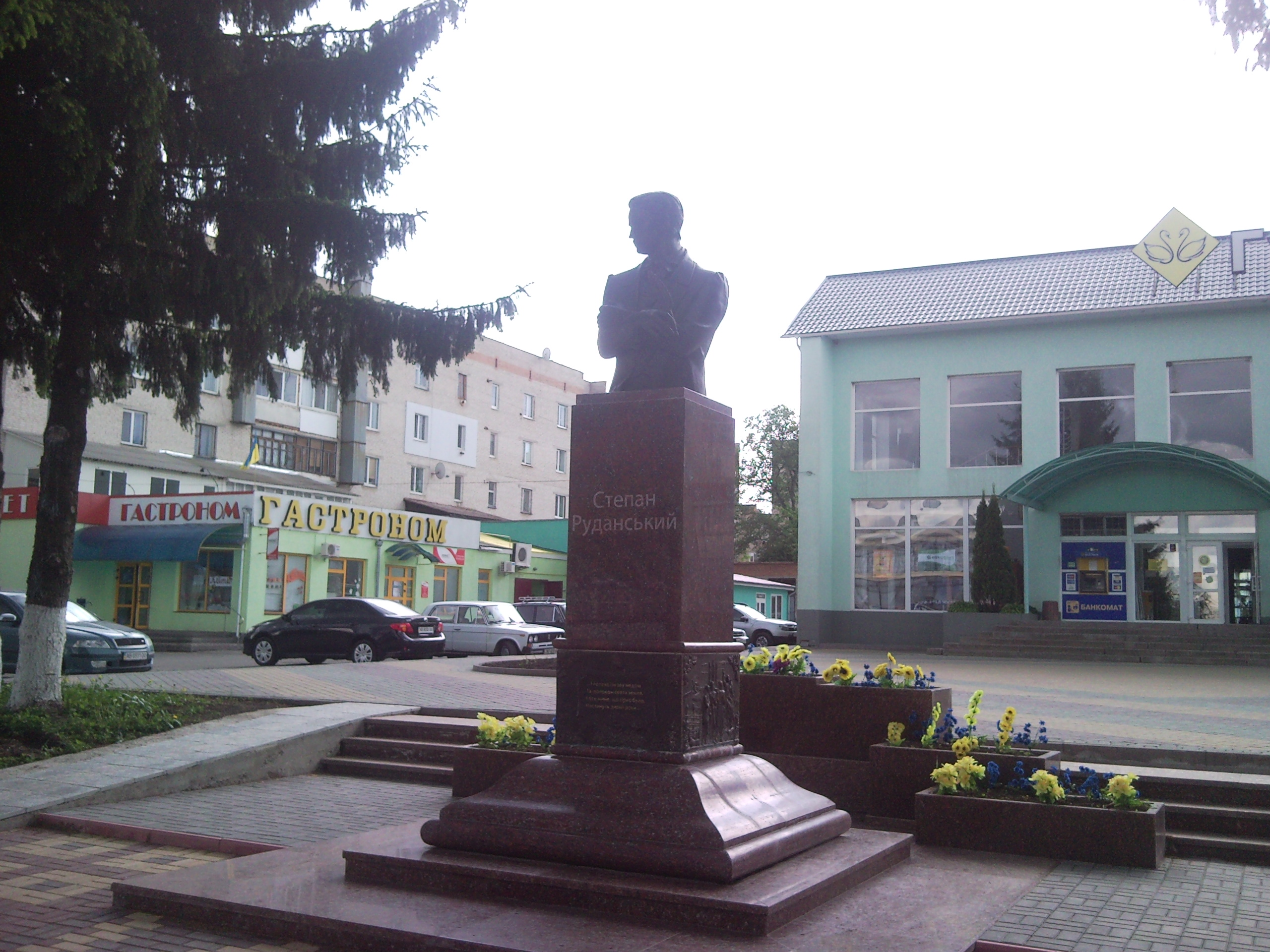 Калинівка Пам'ятник С.Руданськом